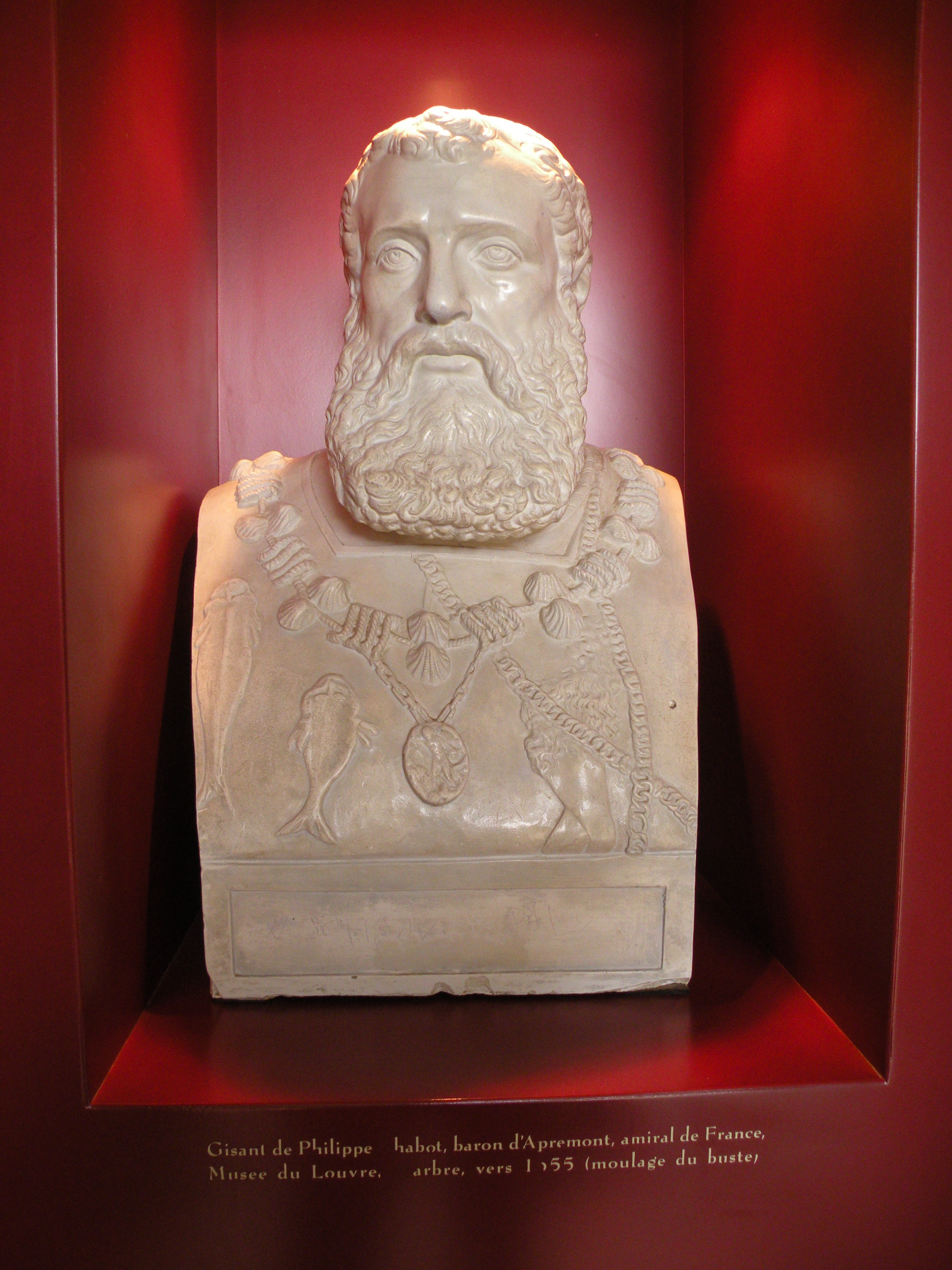 buste de philipe chabot baron d'apremont, amiral de france, vendée 2009-08-20